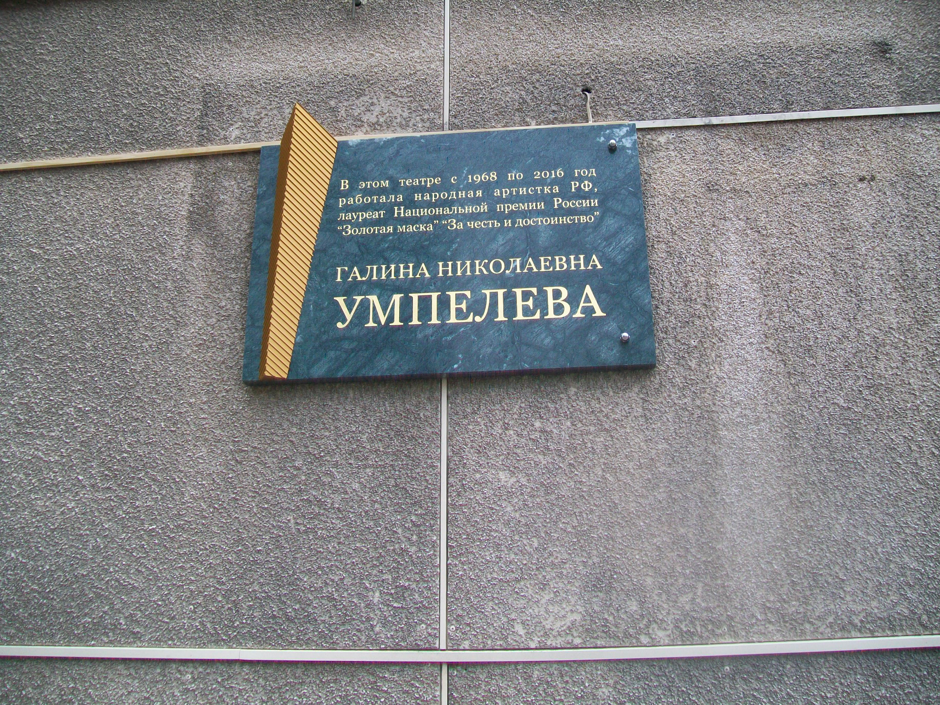 Мемориальная доска в память о Галине Умпелевой на здании Свердловского драматического театра. Екатеринбург, август 2017 года